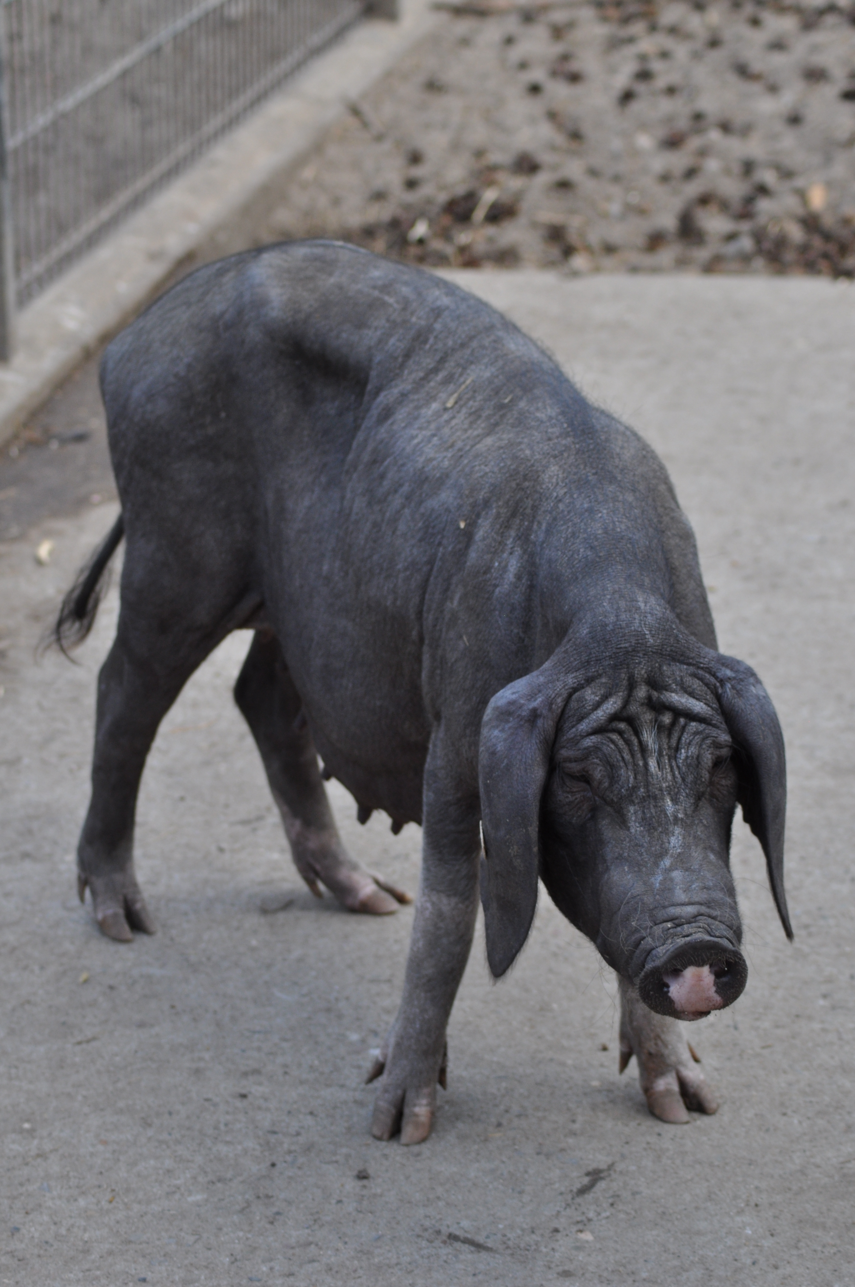 Meishan-Schwein (Chinesisches Maskenschwein)